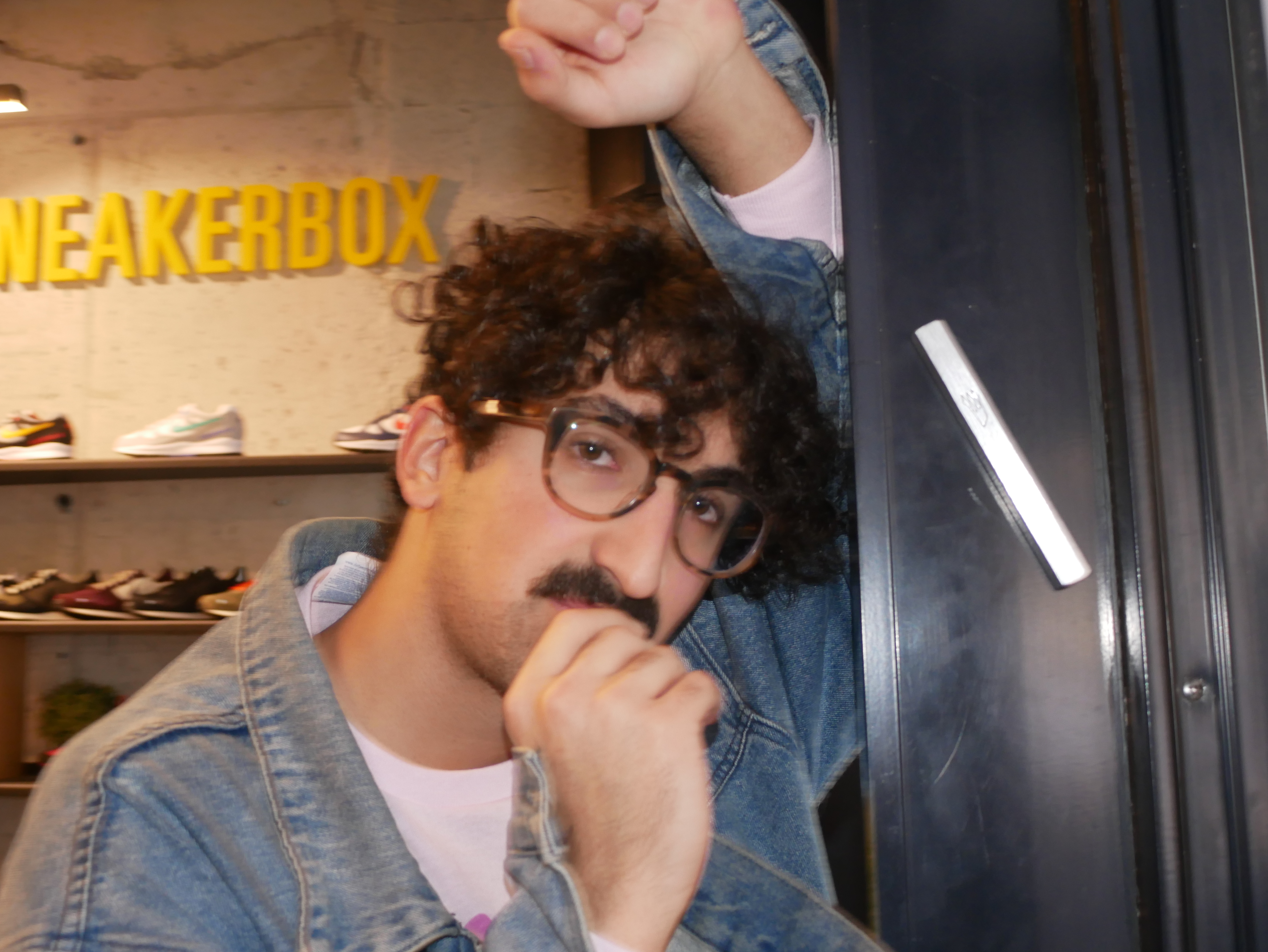 מיכאל סוויסה מנשק מזוזה